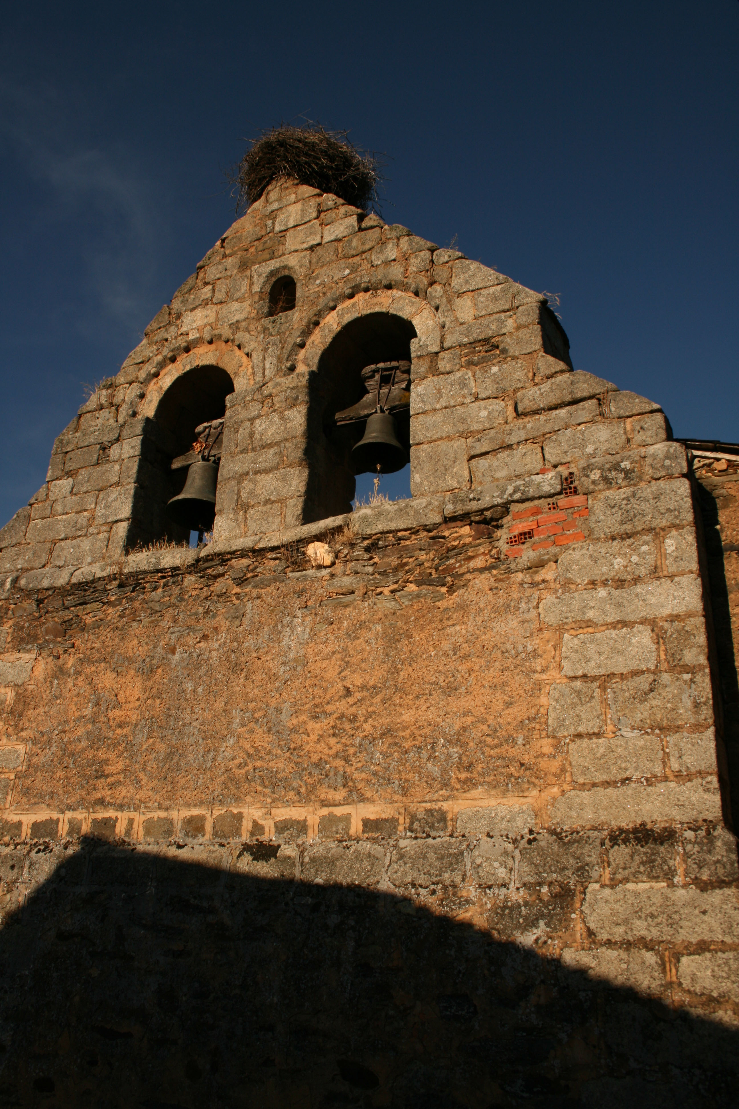 Detalle del Campanario de la Iglesia de Palazuelo de las Cuevas (Aliste - España) denominada de San Vicente Mártir